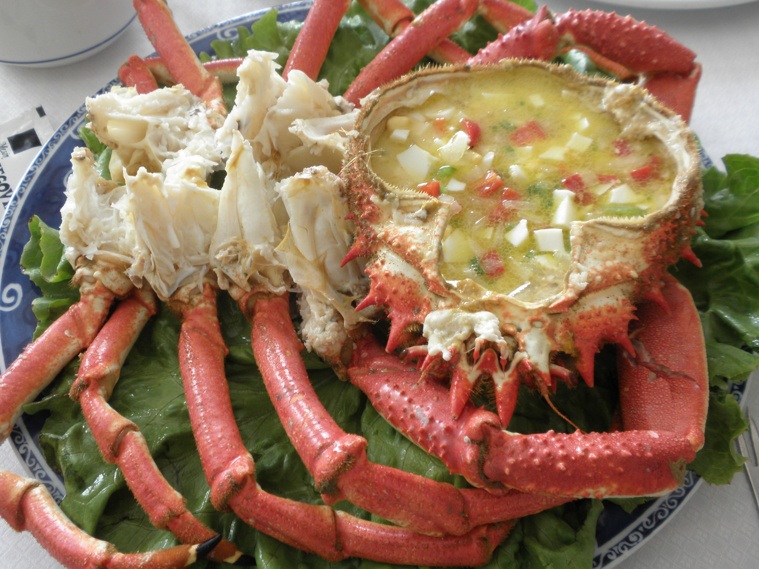 Un centollo emplatado.